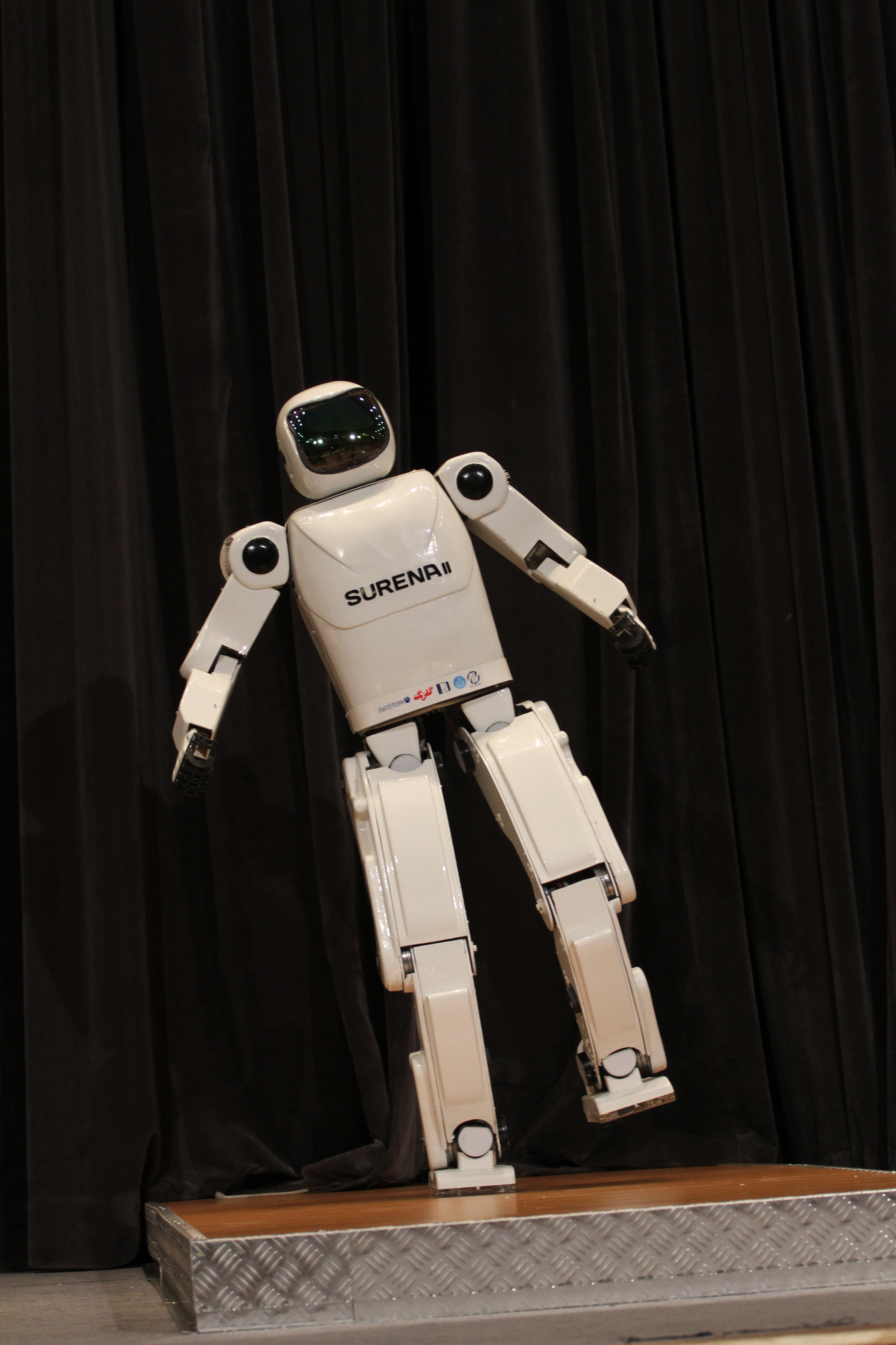 رونمایی از سورنا2